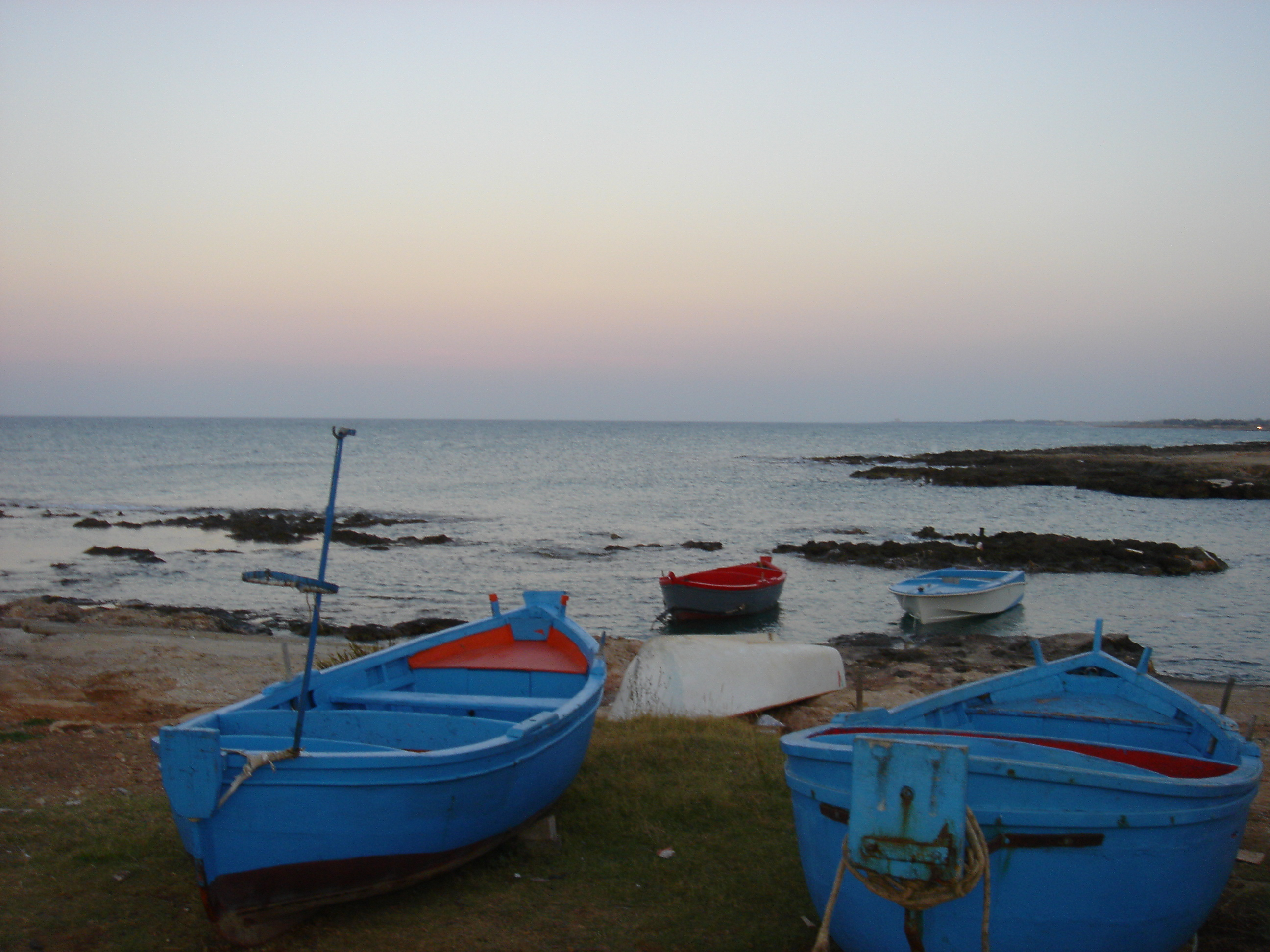 È il porticciolo di Specchiolla, comune di Carovigno in provincia di Brindisi